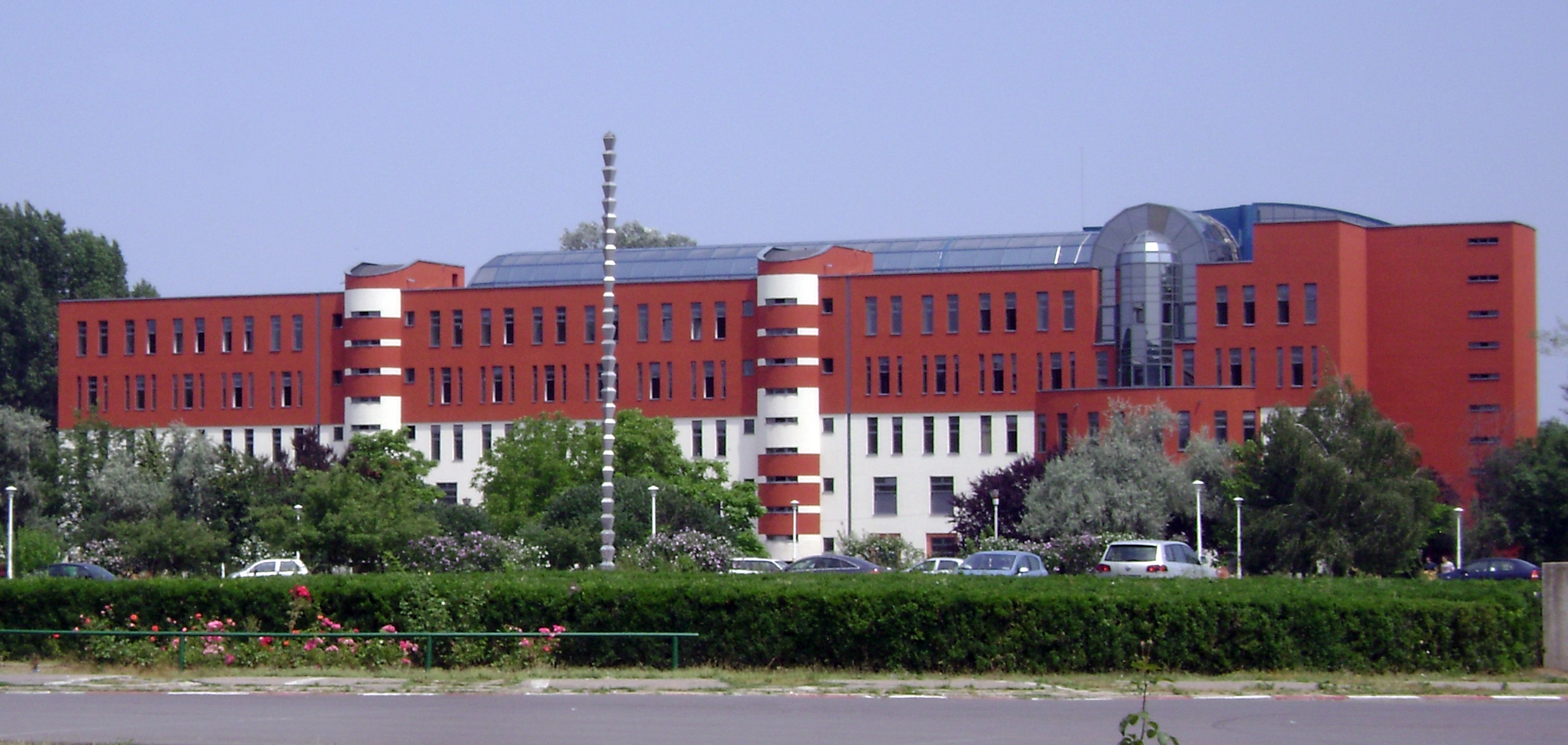 the new library of the Politehnica University of Bucharest